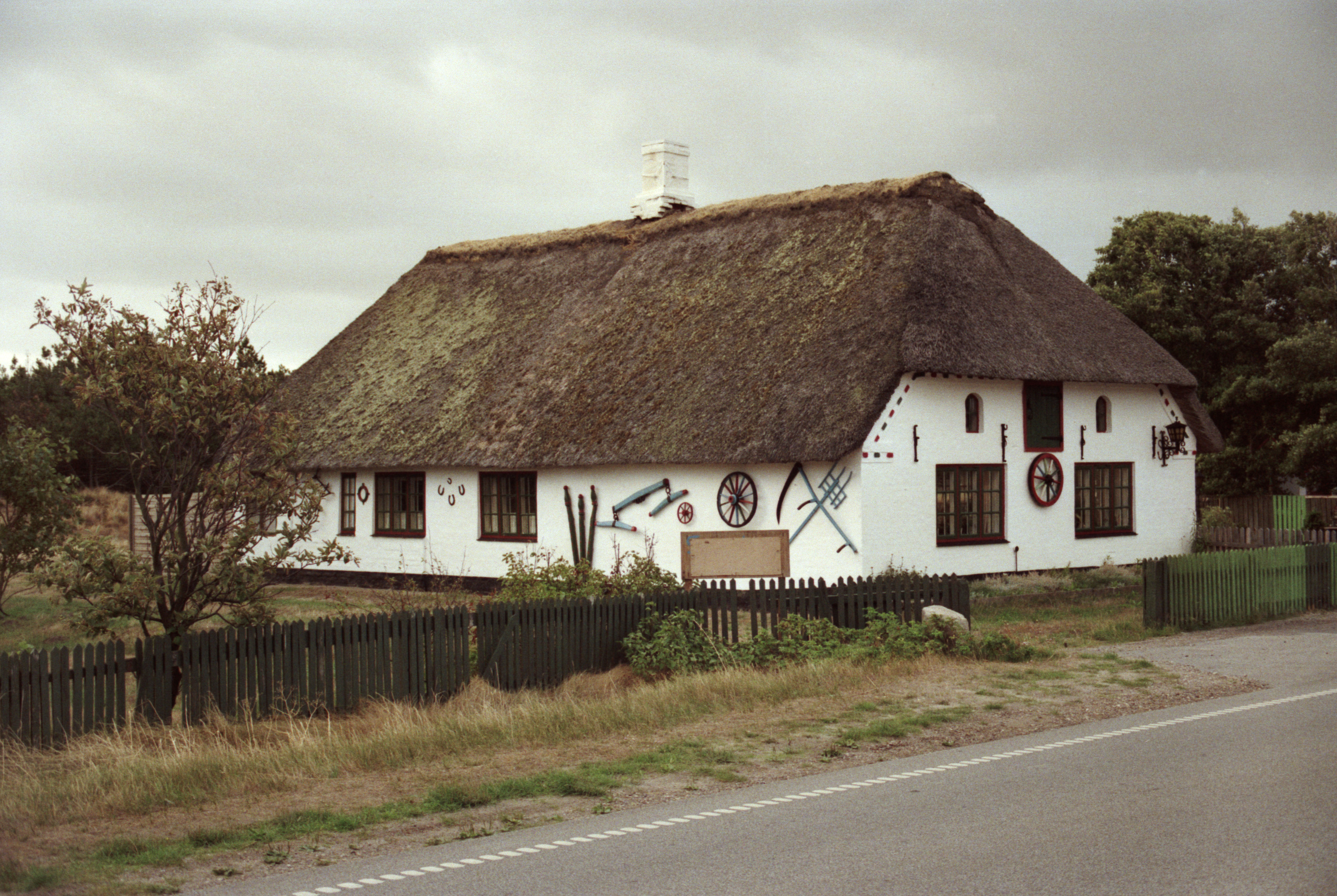 Rømø - Friesenhaus